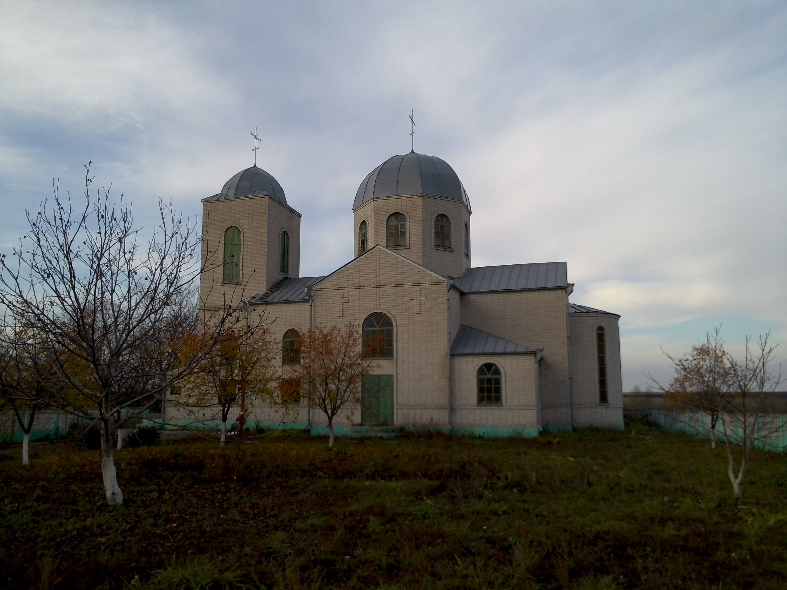 с. Вербівка. Церква